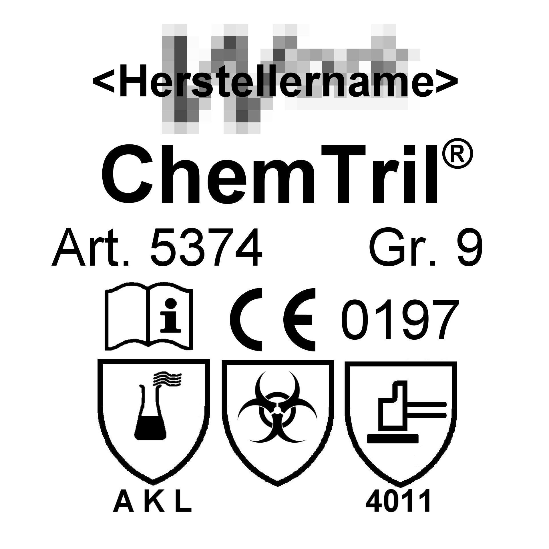 Beispielhafte Kennzeichnung eines Schutzhandschuhs der PSA-Kategorie III mit allen notwendigen Pflichtangaben Typ "vollwertiger Chemikalienschutz"